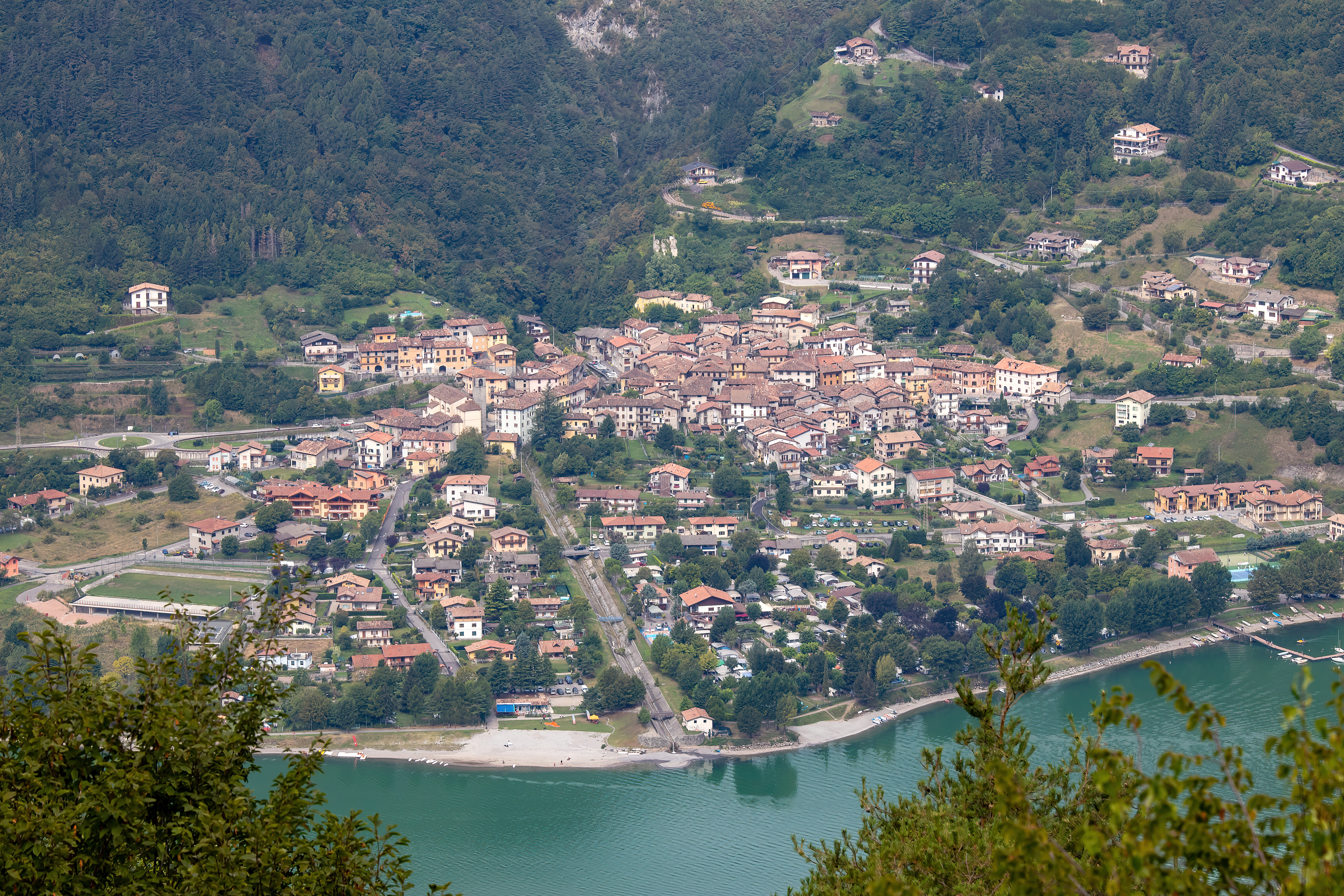 Anfo, Idrosee